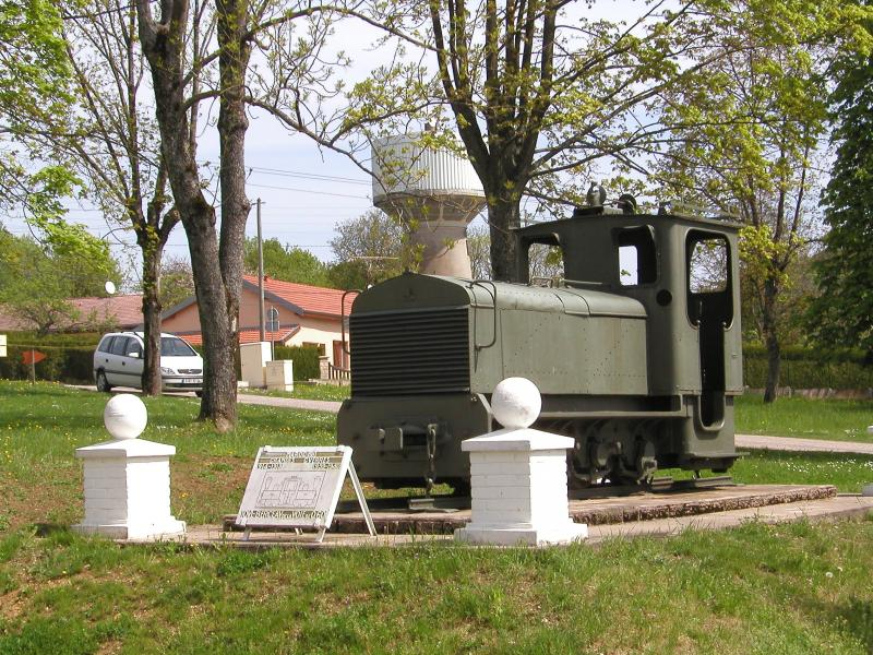 Toul, Locomotive Schneider type LG de 10 t, châssis Péchot. Monument aux Morts des soldats de la voie de 60